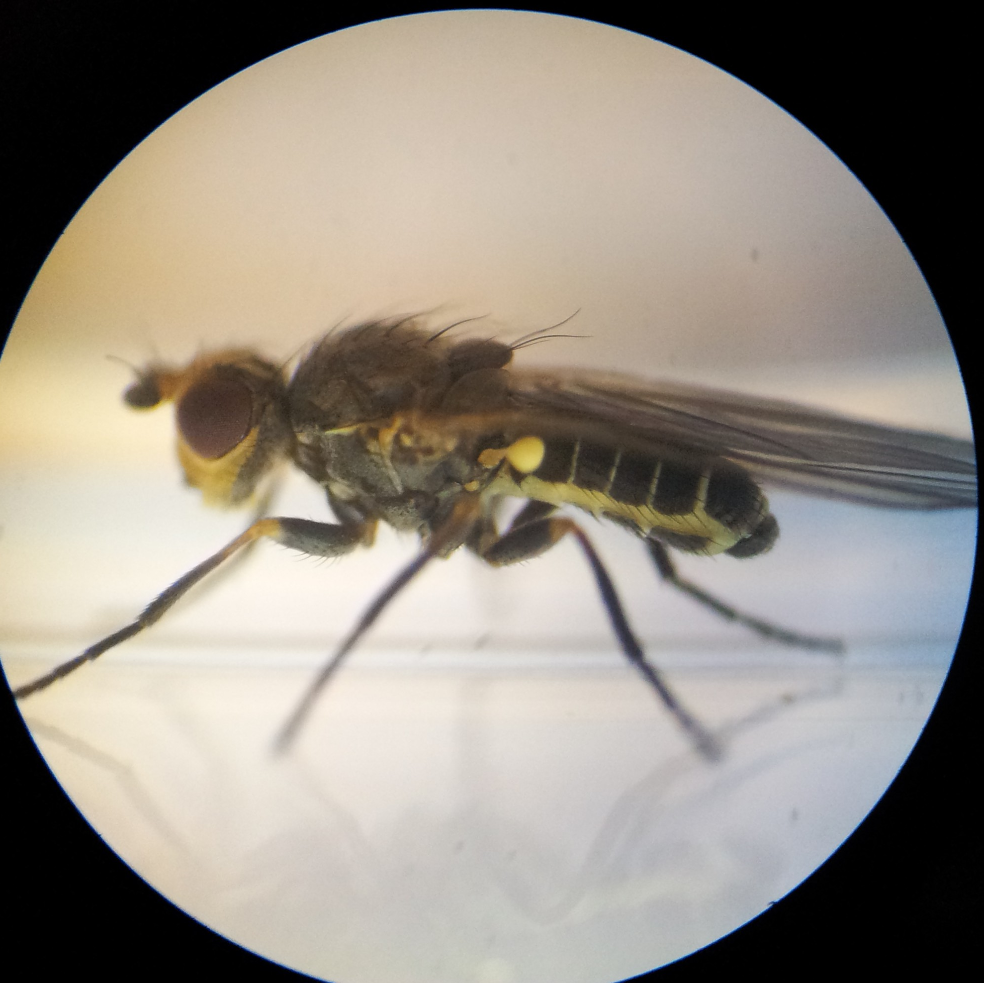 Napomyza gymnostoma (à confirmer) Obtenue après 30 jours d'incubation de pupes récoltées sur un poireau. Grossissement 32x